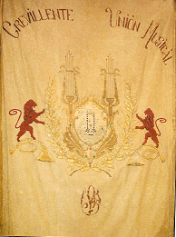 Bandera de la Unión Musical de Crevillent